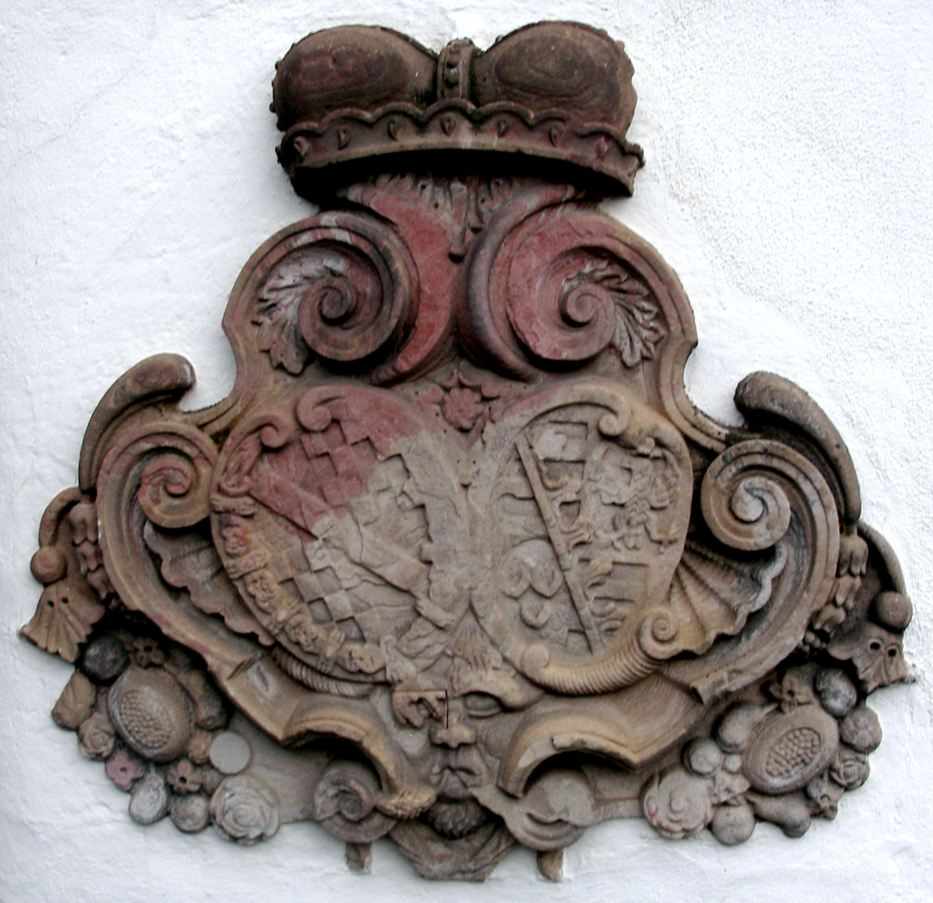 Hofgut Retters in Kelkheim (Taunus); Allianzwappen Baden/Sachsen-Lauenburg (evtl. Spolie aus der Sammlertätigkeit der Besitzer im 20. Jahrhundert?), vielleicht Allianzwappen des Markgrafen Ludwig Wilhelm von Baden und seiner Ehefrau Franziska Sibylla Augusta von Sachsen-Lauenburg